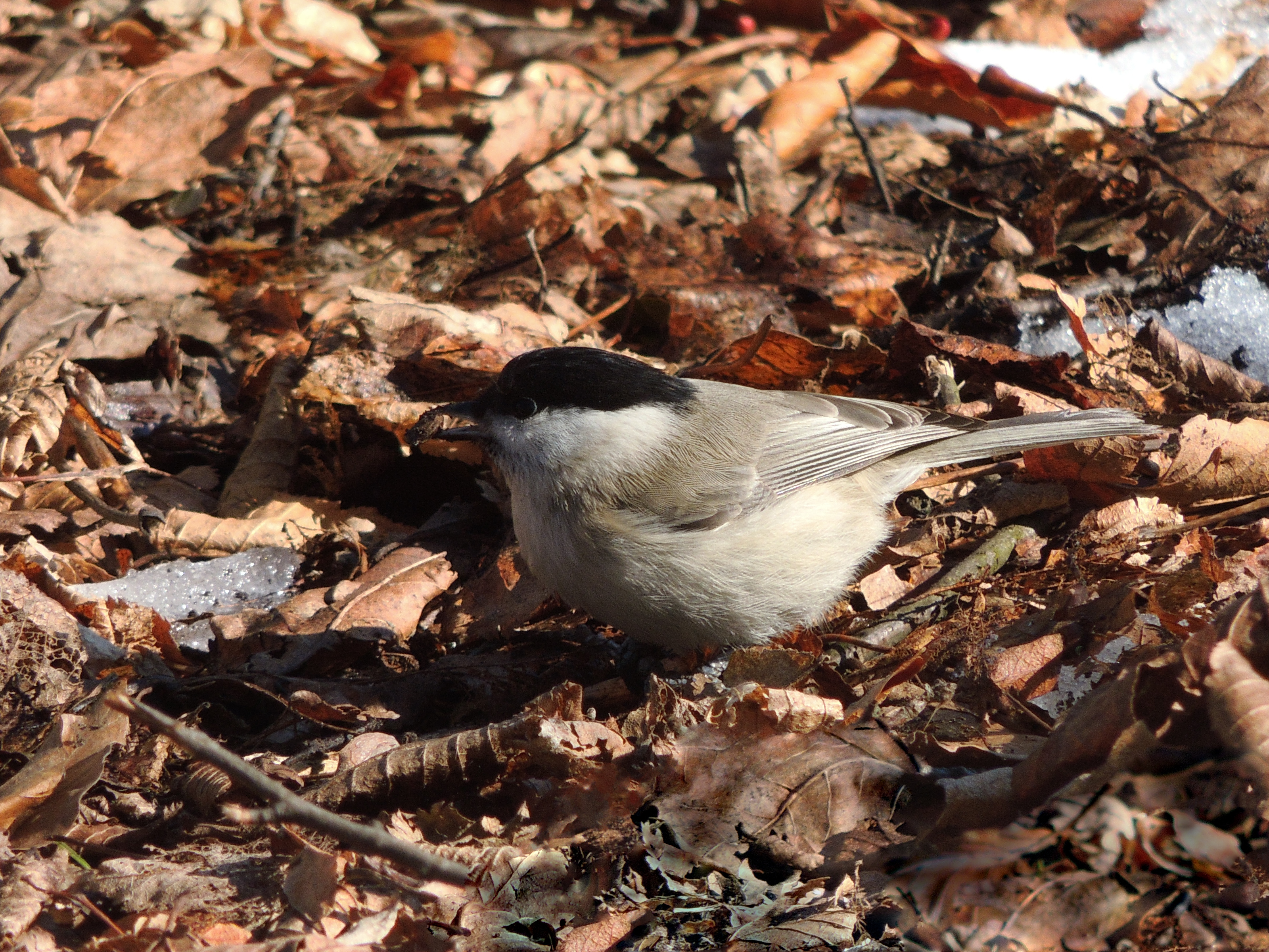 Marsh tit Sumpfmeise Pițigoi sur